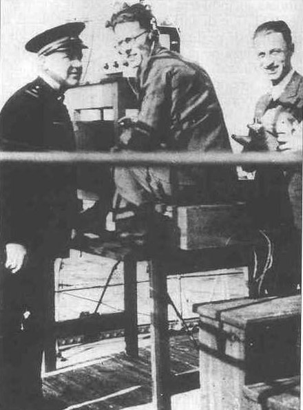 Il Prof. Carrara durante prove del radar sperimentale EC-1 sulla terrazza del'Instututo E.C. (1935)